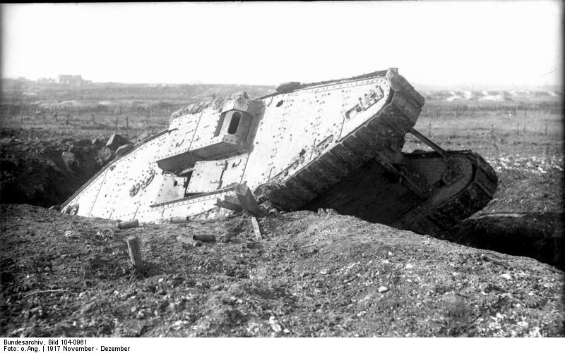 I. Weltkrieg 1914-1918 Moenvres Tank beim Überqueren eines Schützengrabens